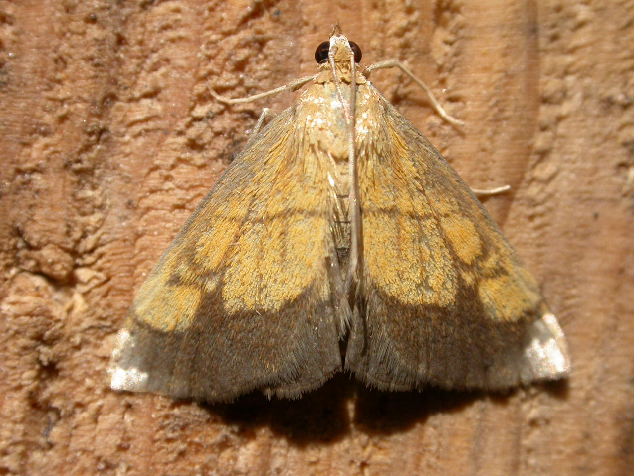 Evergestis limbata, to MV light, Hellerup, Denmark, 17 July 2003